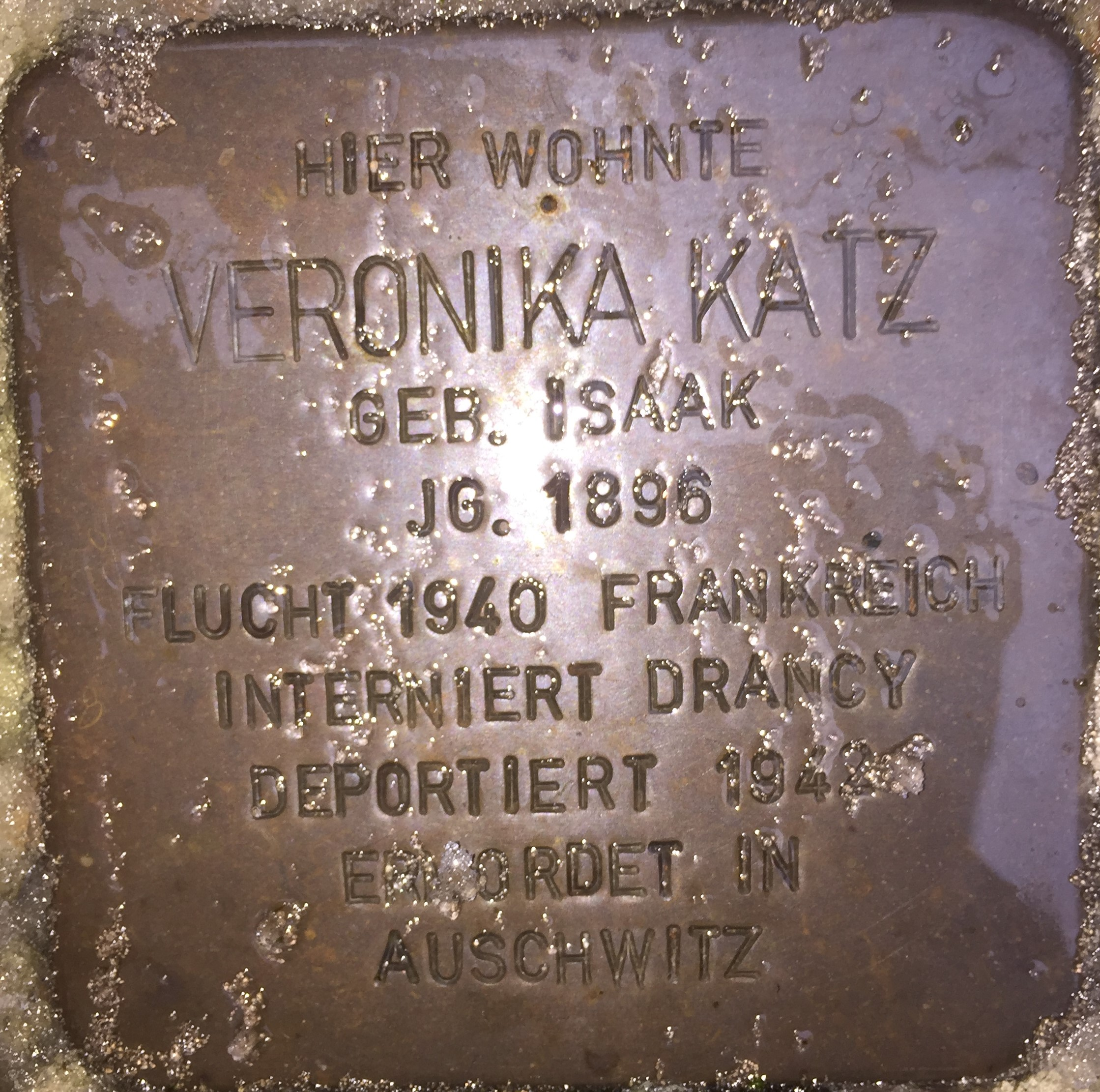 Der Stolperstein von Veronika Katz geb. Isaak im Matzenecken